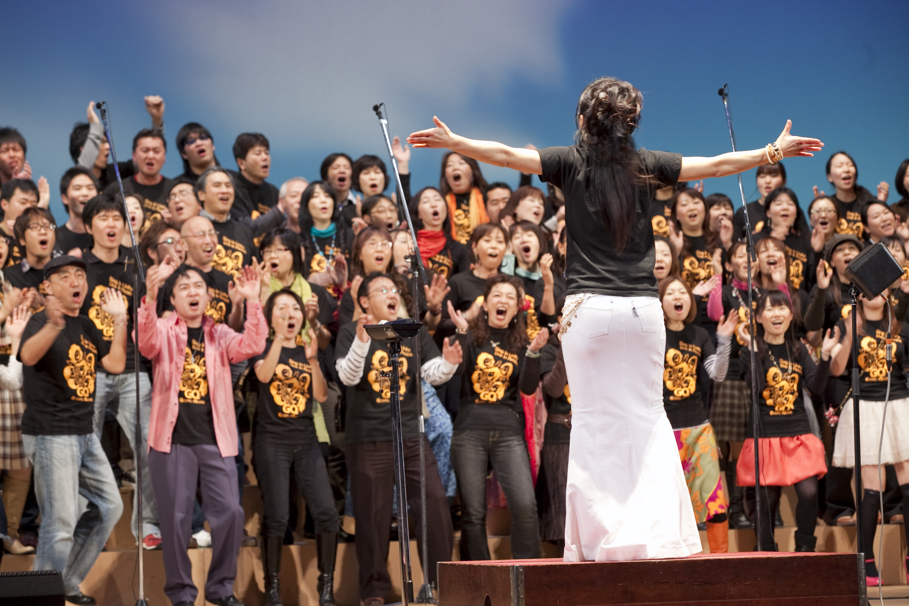 Jenna_gp2